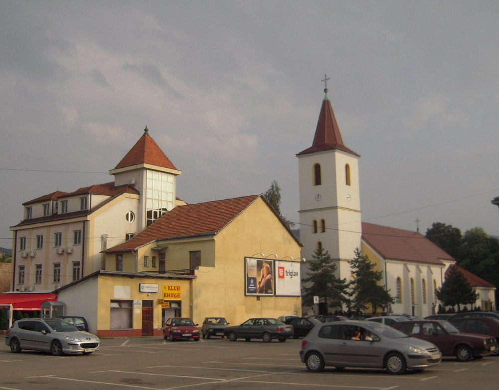 Жупна црква Подхода Блажене Дјевице Марије